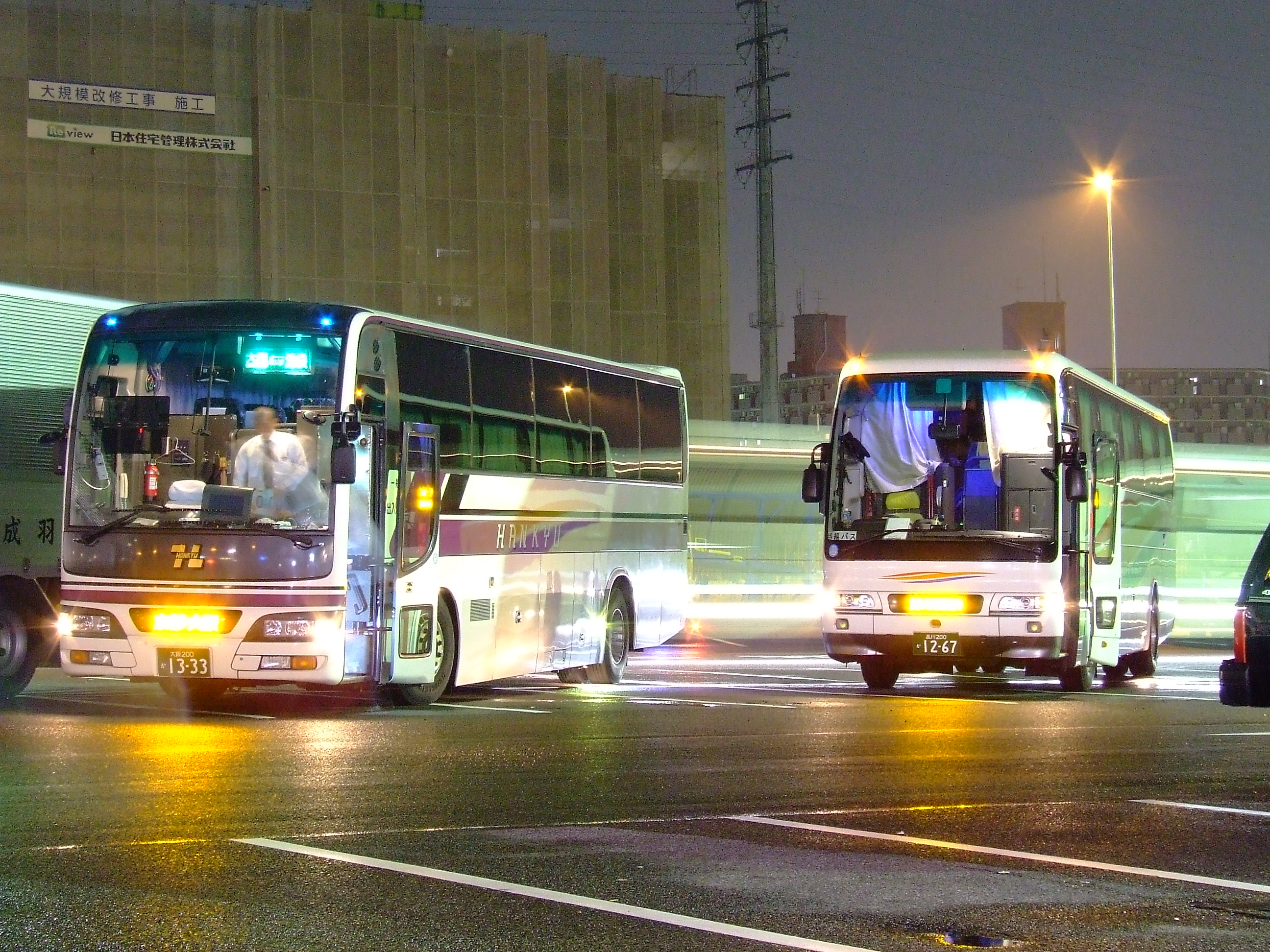 東京～阪急梅田系統 右が羽田京急バスの「シャトー号」、左が阪急バスの池袋線 草津PAにて